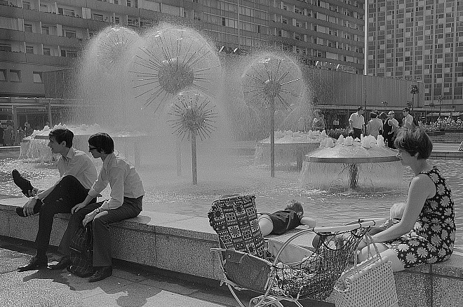 Original image description from the Deutsche FotothekDresden. Wasserspiel von Leonie Wirth auf der Prager Straße